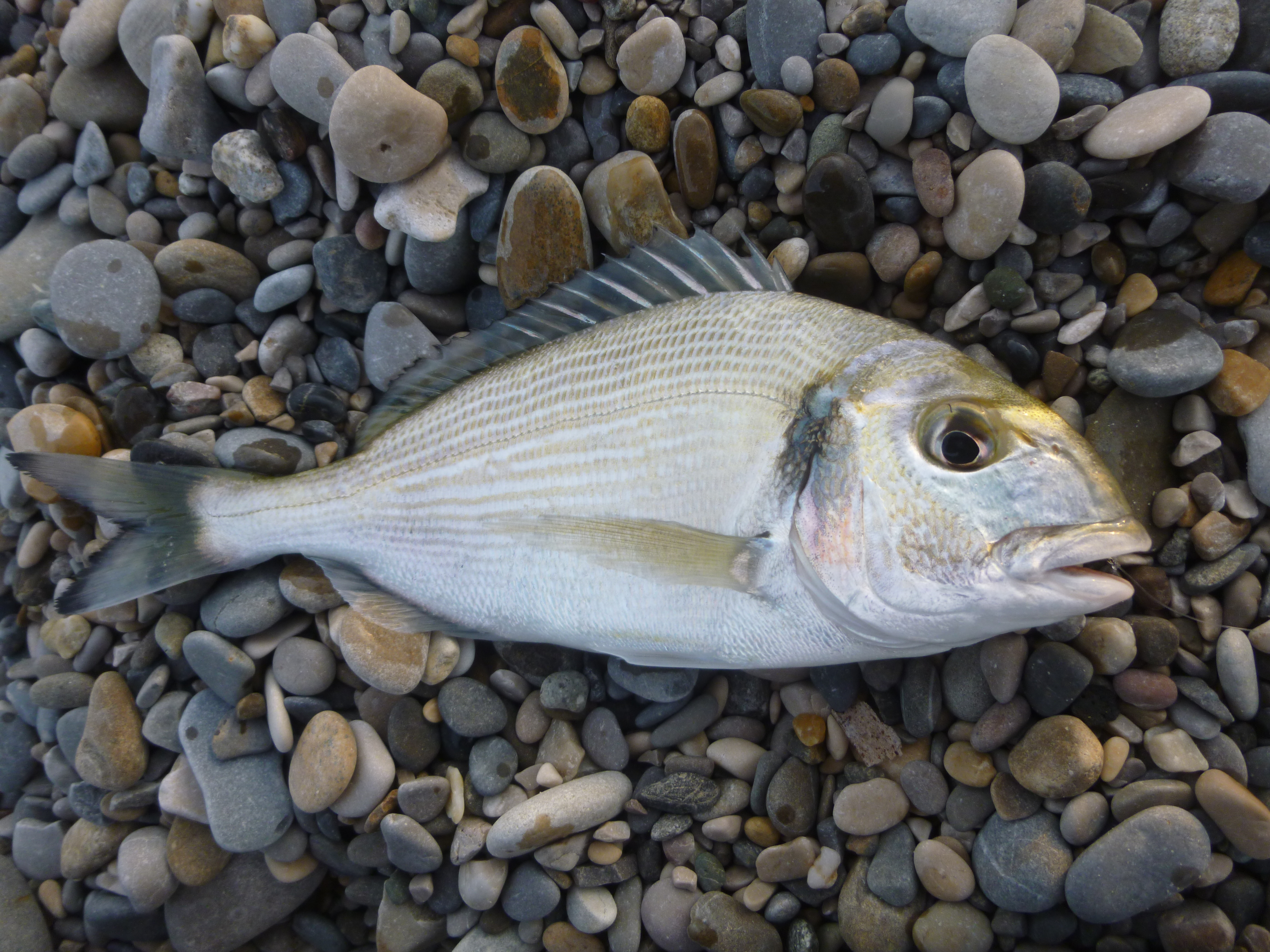 Petite daurade capturée en pêchant à la ligne du bord à Marseille